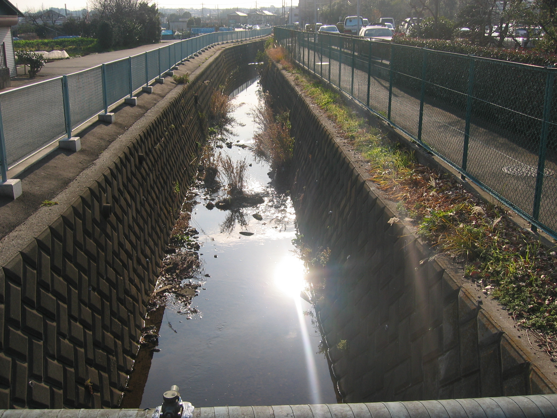 2004年12月27日、利用者自身の撮影。